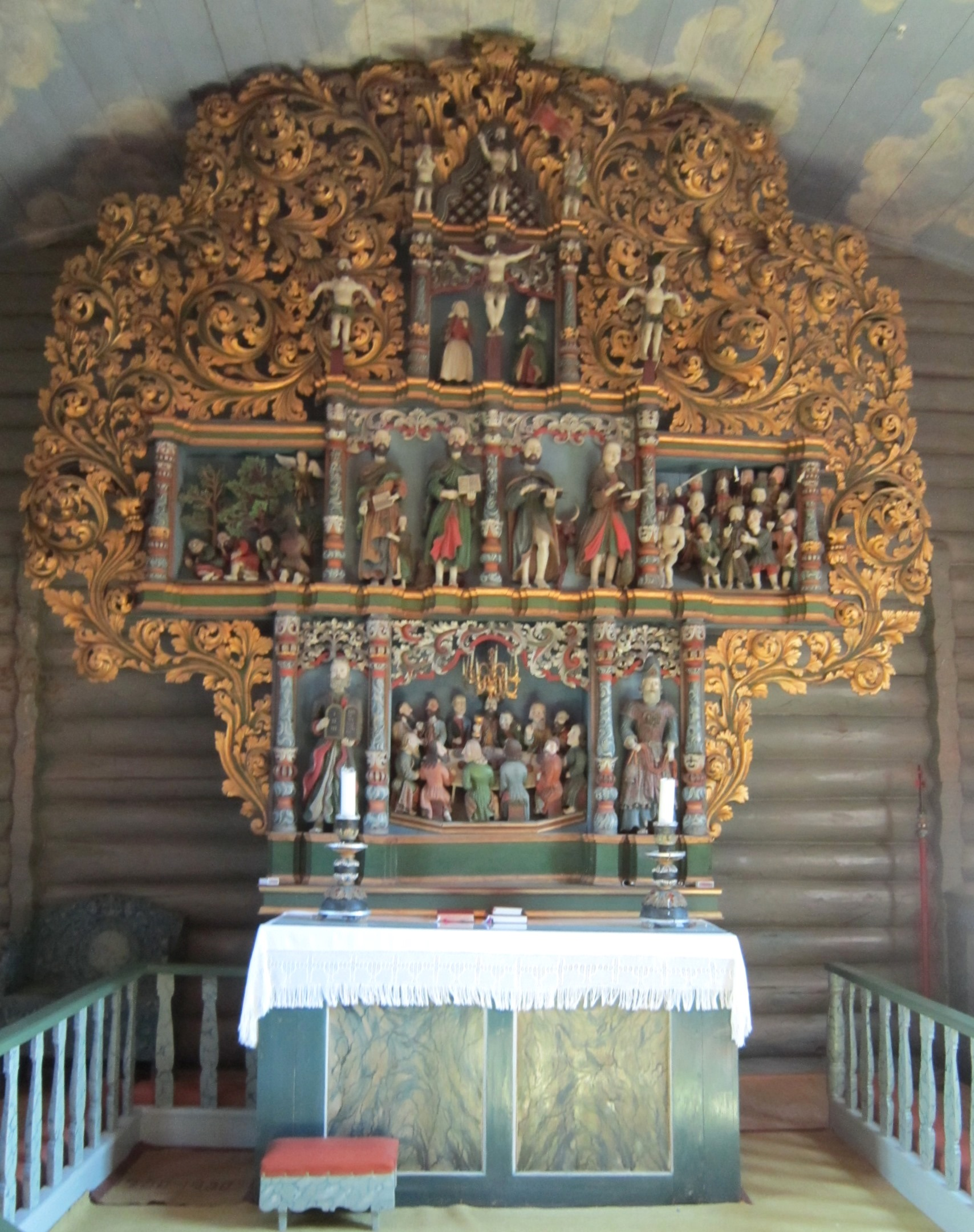 Altertavlen i Lesja kirke